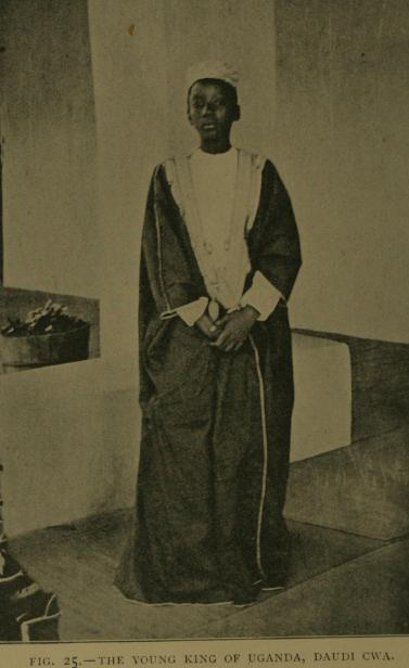 Daudi Cua